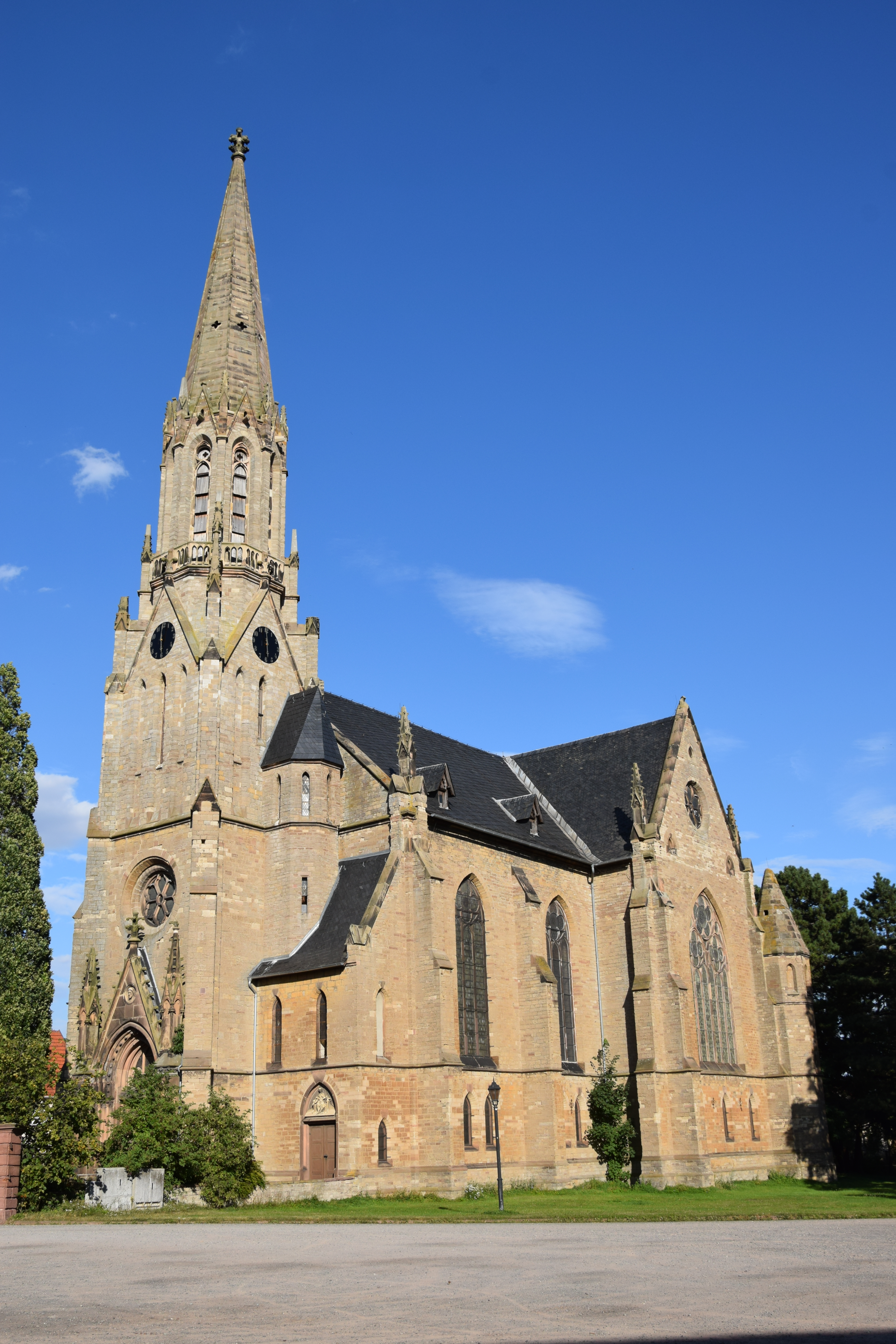 Roßla, St. TrinitatisThis is a photograph of an architectural monument. 83084